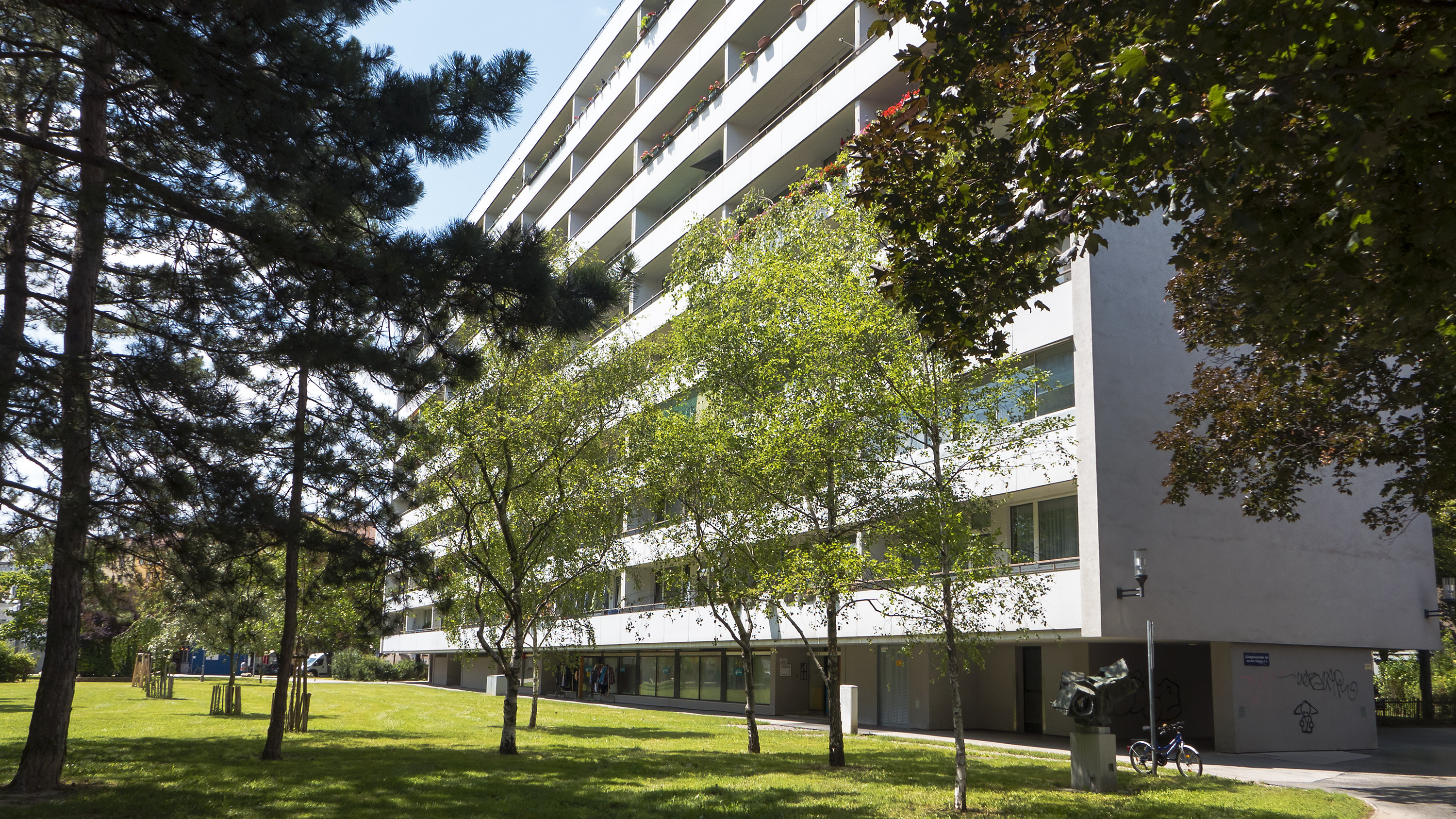 Wohnhausanlage Vorgartenstraße 158-170 in Wien 2